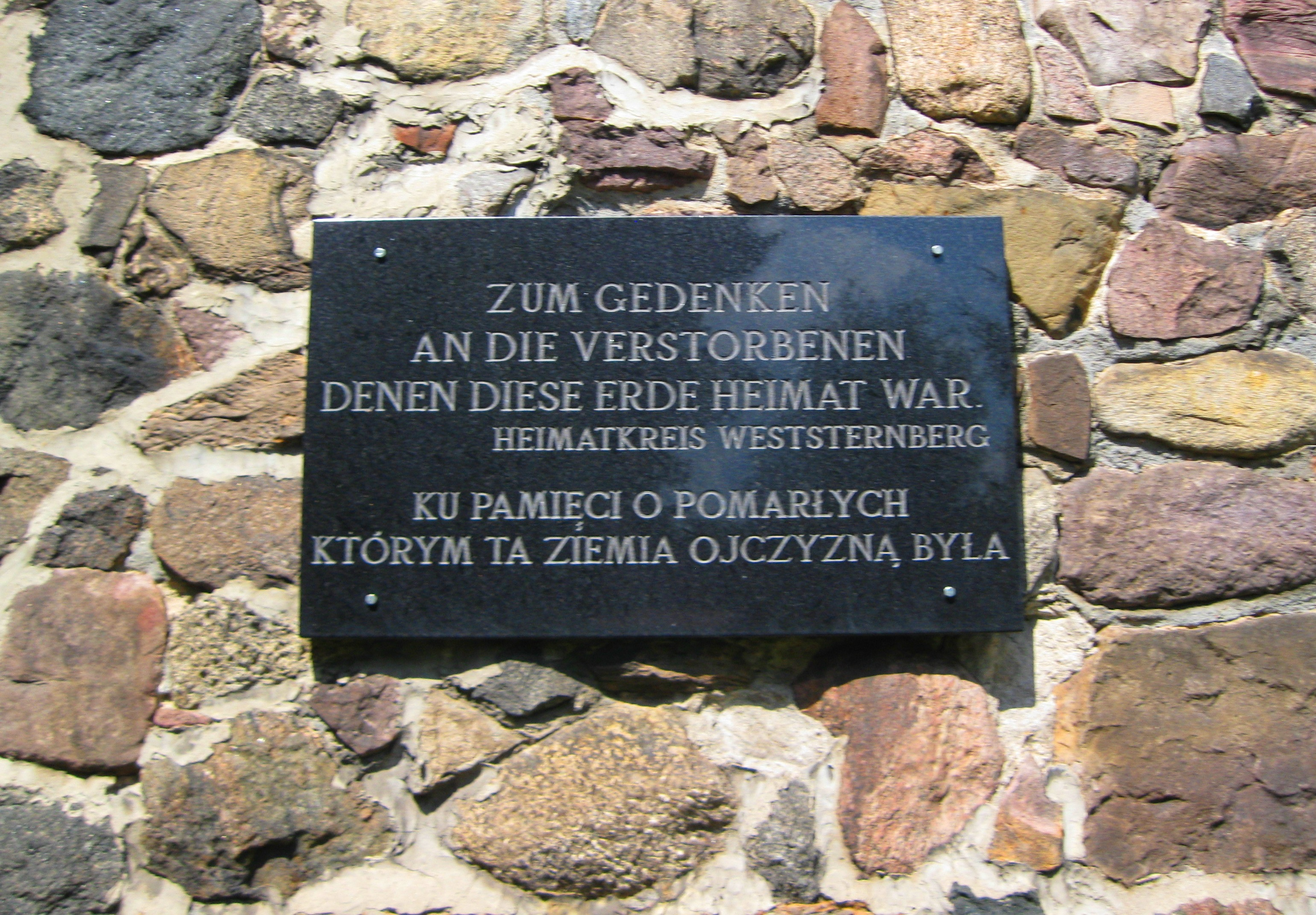 Tablica na ścianie kościoła Najświętszego Serca Pana Jezusa w Rzepinie. Upamiętnia ona mieszkańców dawnego niemieckiego powiatu zachodniotorzymskiego (Kreis Weststernberg).